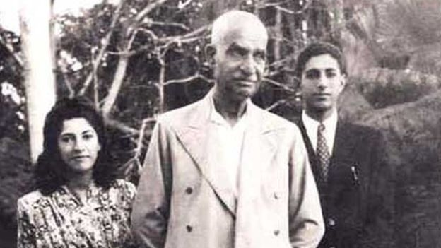 رضا شاه به همراه علیرضا و شمس پهلوی در ژوهانسبورگ